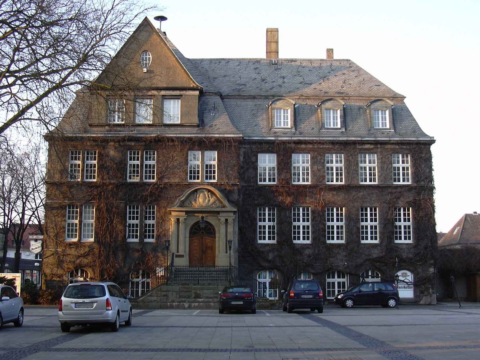 Rathaus Holzwickede (von Süden) This is a photograph of an architectural monument.